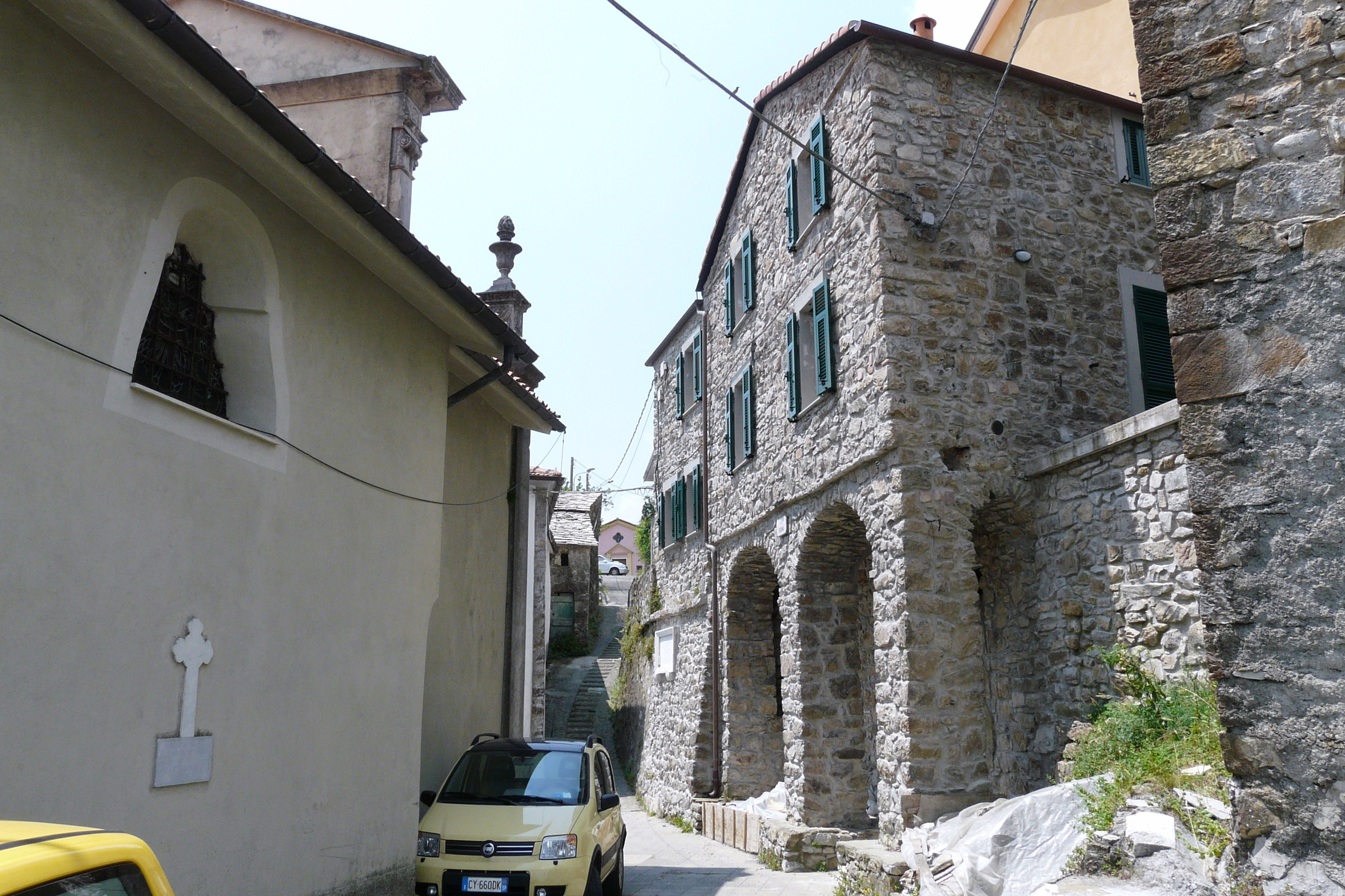 Centro storico di Maissana, Liguria, Italia